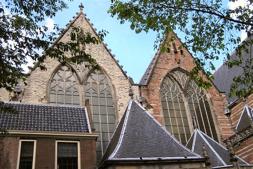 Photo que j'ai prise le 14 mai 2007 BRUNNER Emmanuel (manu25)